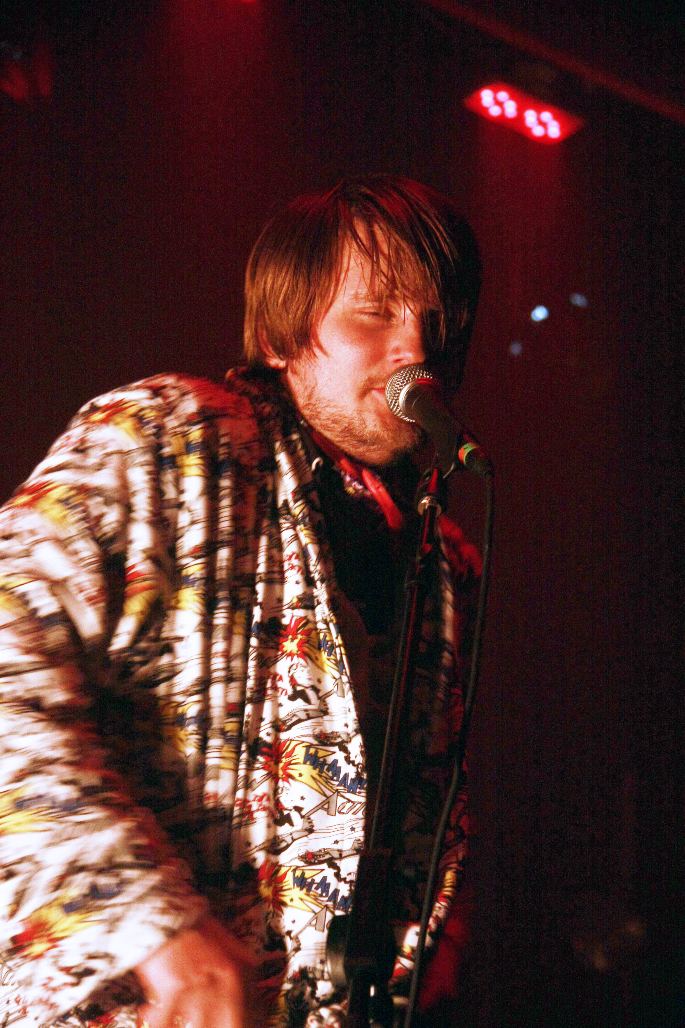 Torbjorn Brundtland of Royksopp @ Arvikafestivalen 2009 in Sweden